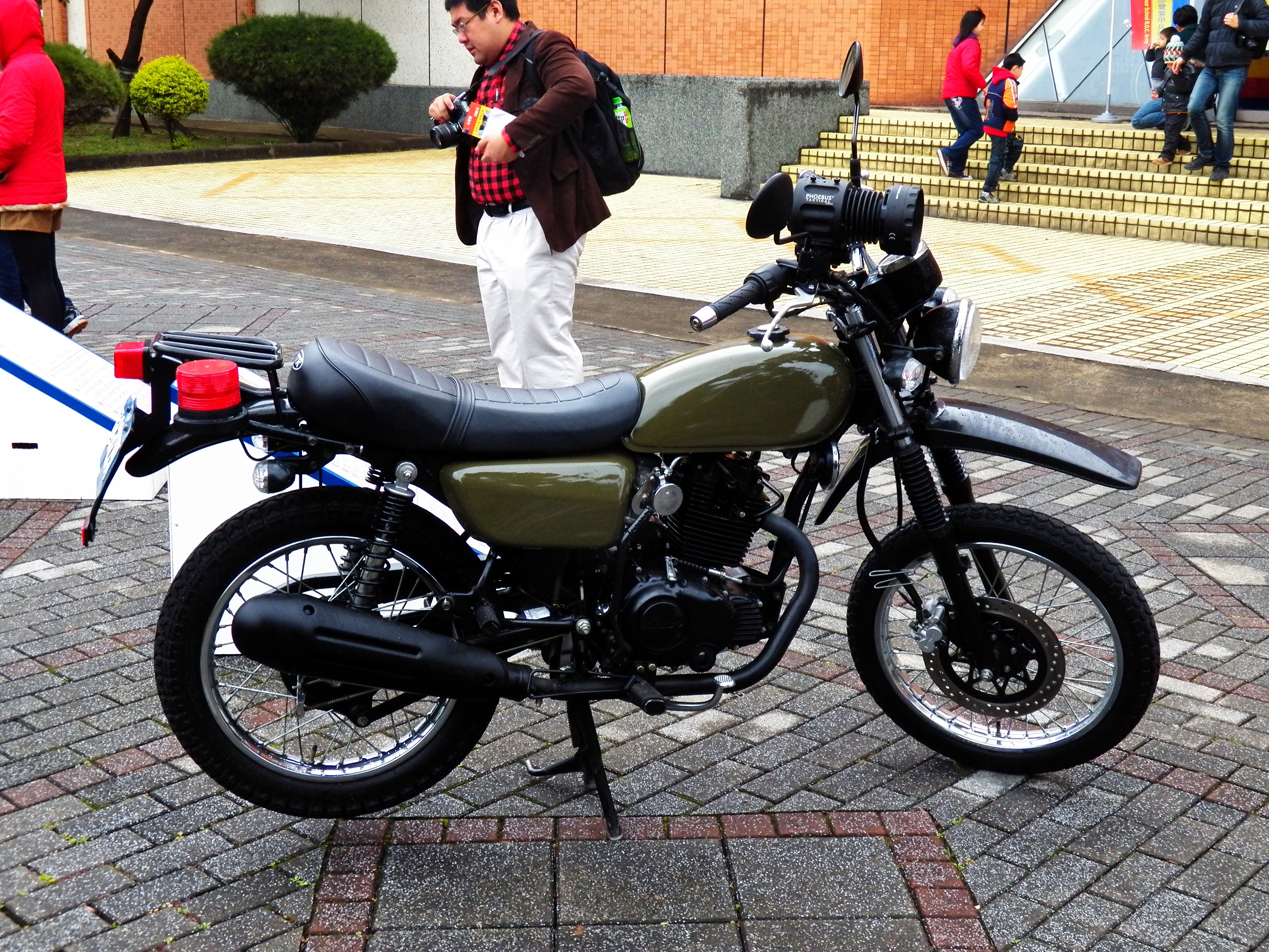 2013年裝甲兵學校營區開放活動，校史館前展示的光陽KTR 125機車右側。